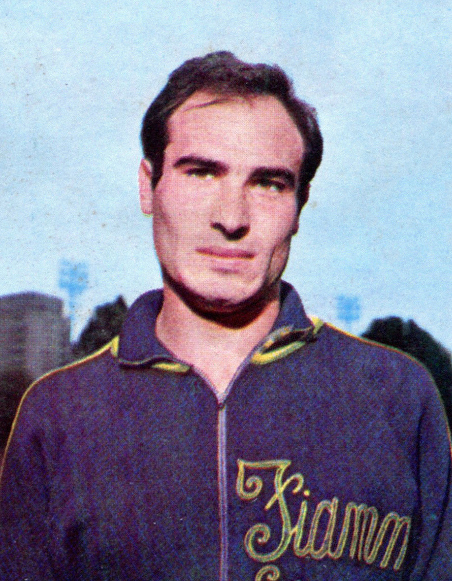 CAMPIONI DELLO SPORT 1966/67 - Figurina/Sticker n. 31 - GIANNATTASIO